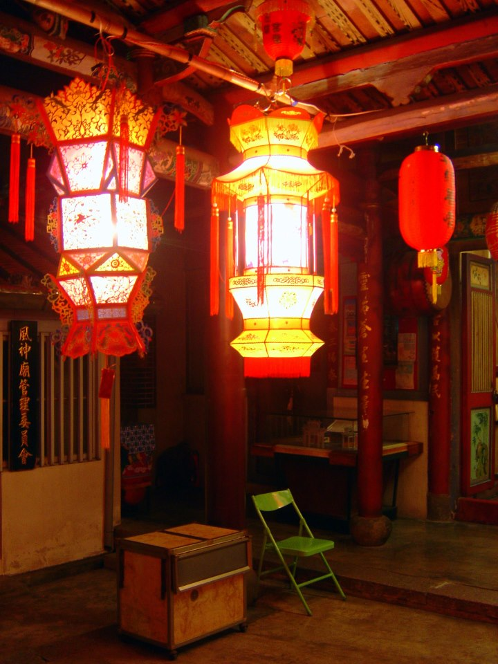 五條港文化園區近年元宵節都會展示泉州花燈。